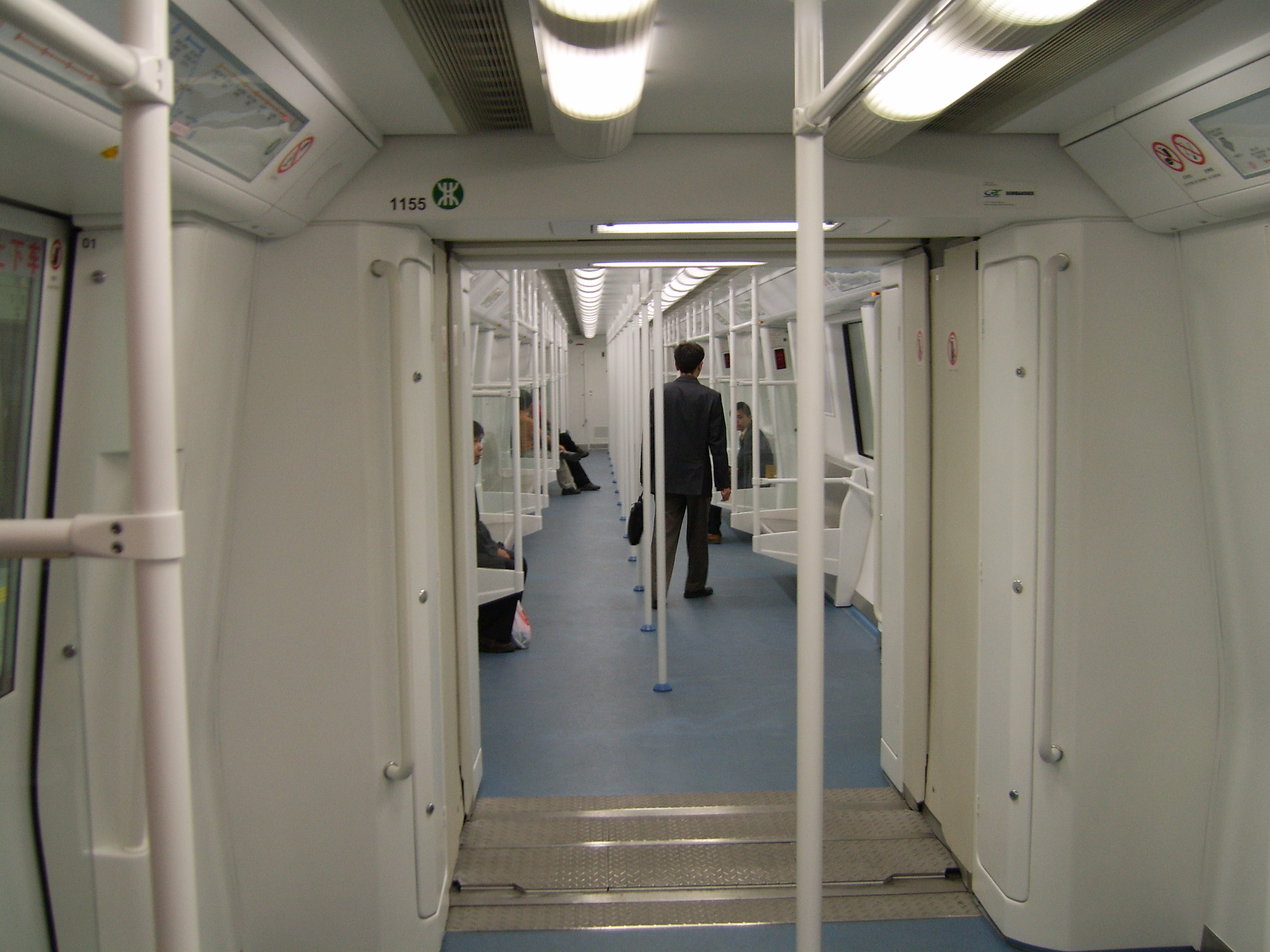 Shenzhen metro